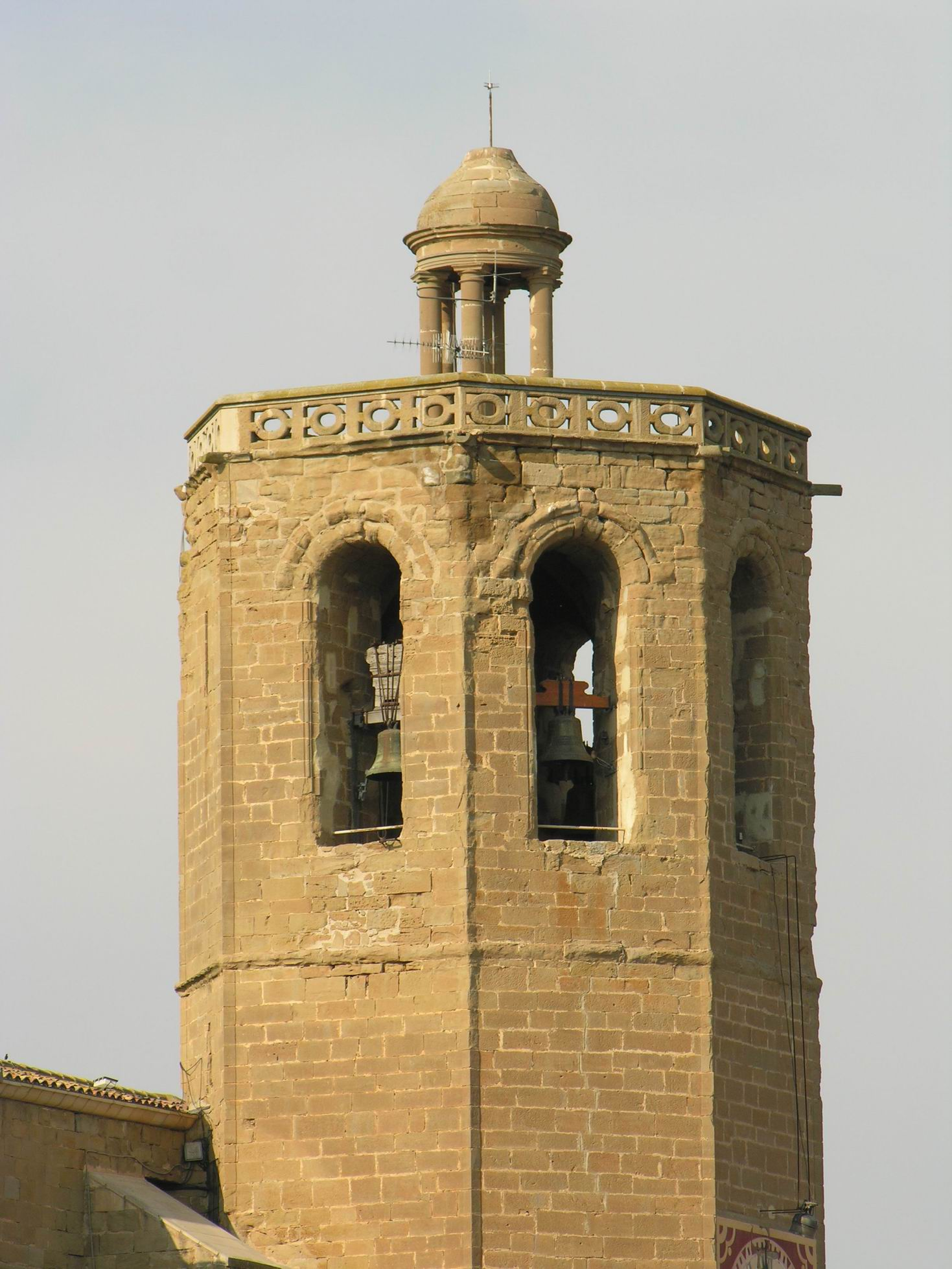 Campanar de Santa Maria de Balaguer, La Noguera, Lleida